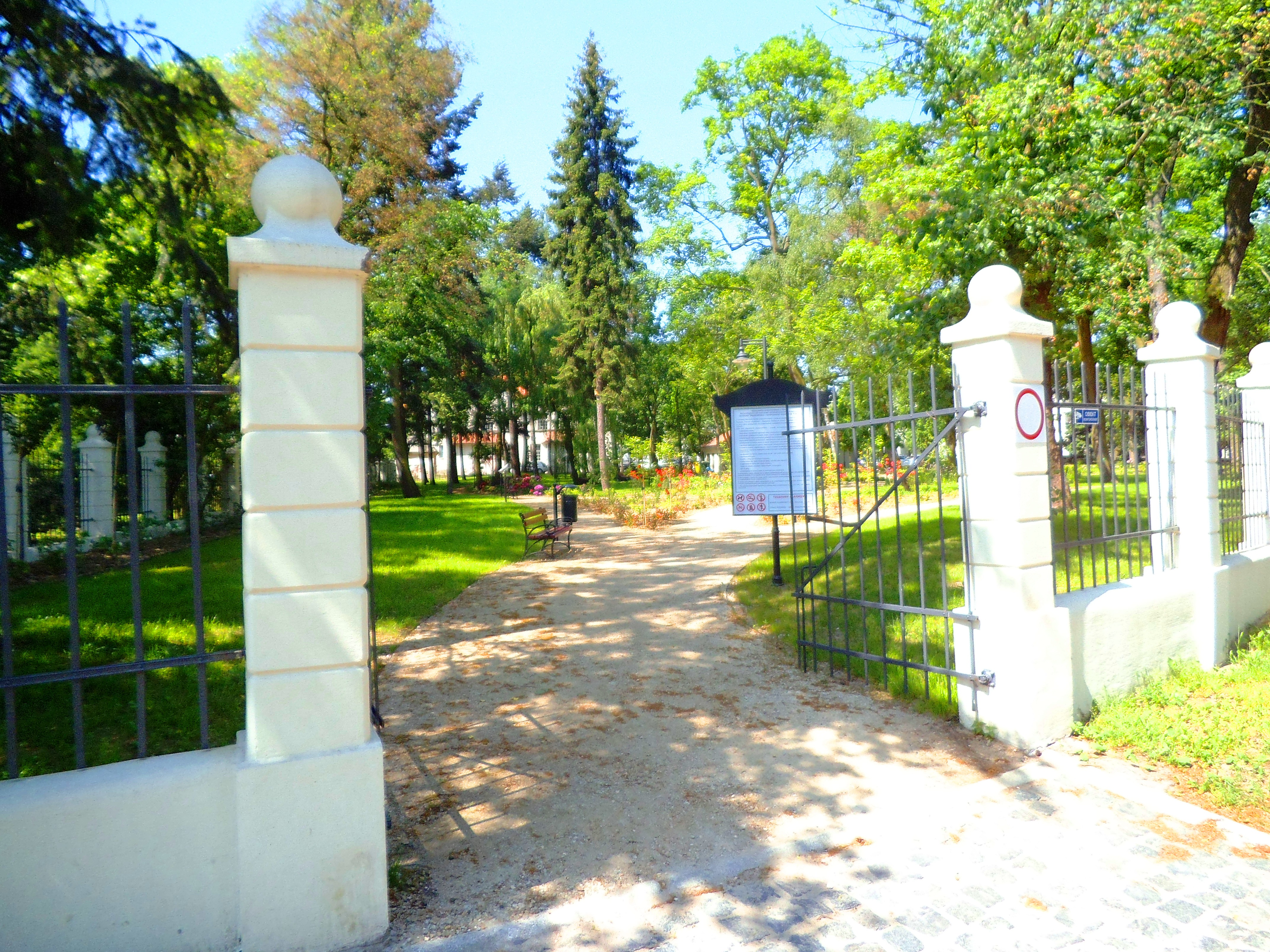 Park wojewodów pomorskich w Toruniu